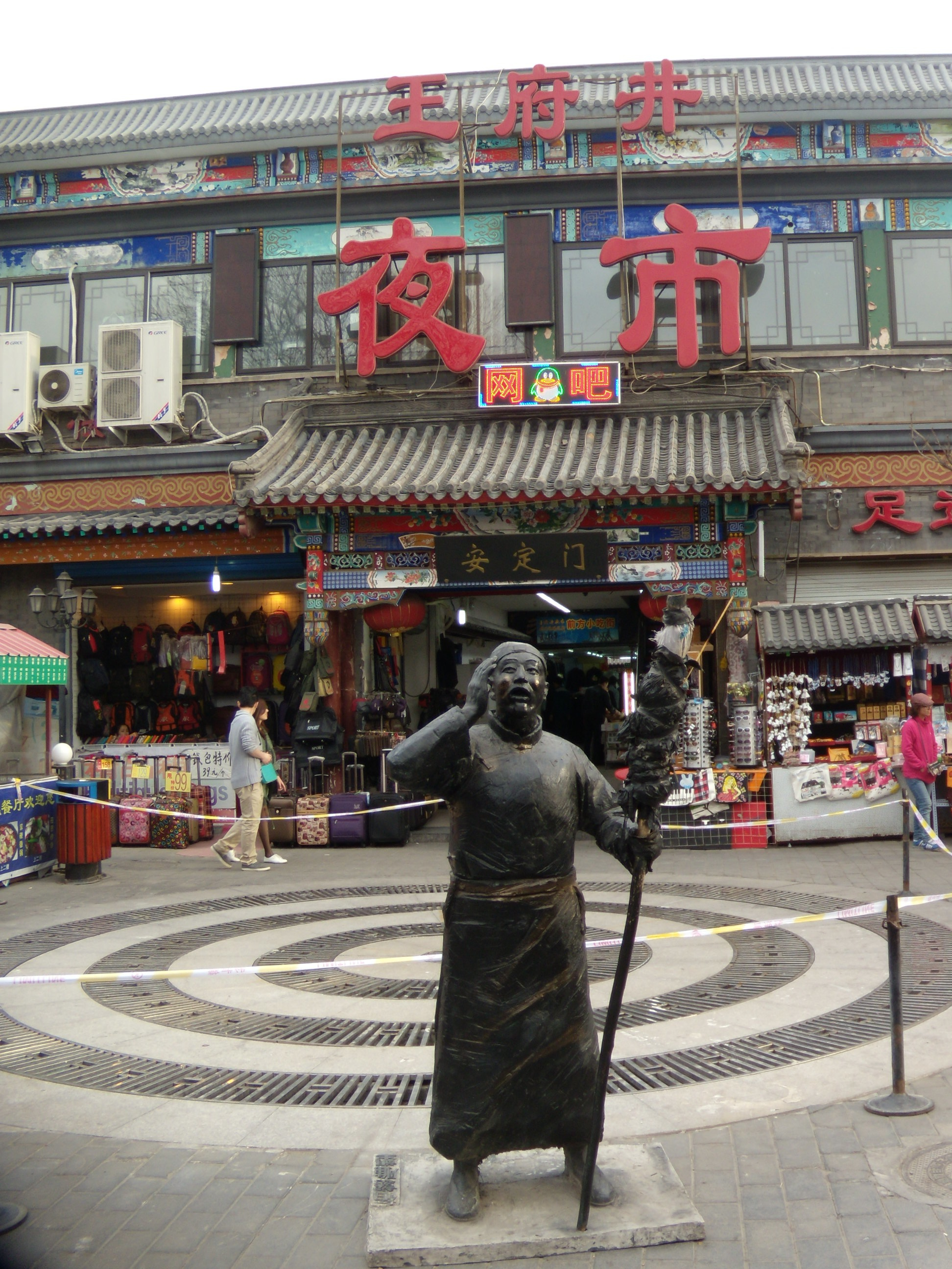 老北京风情街内广场上的雕塑